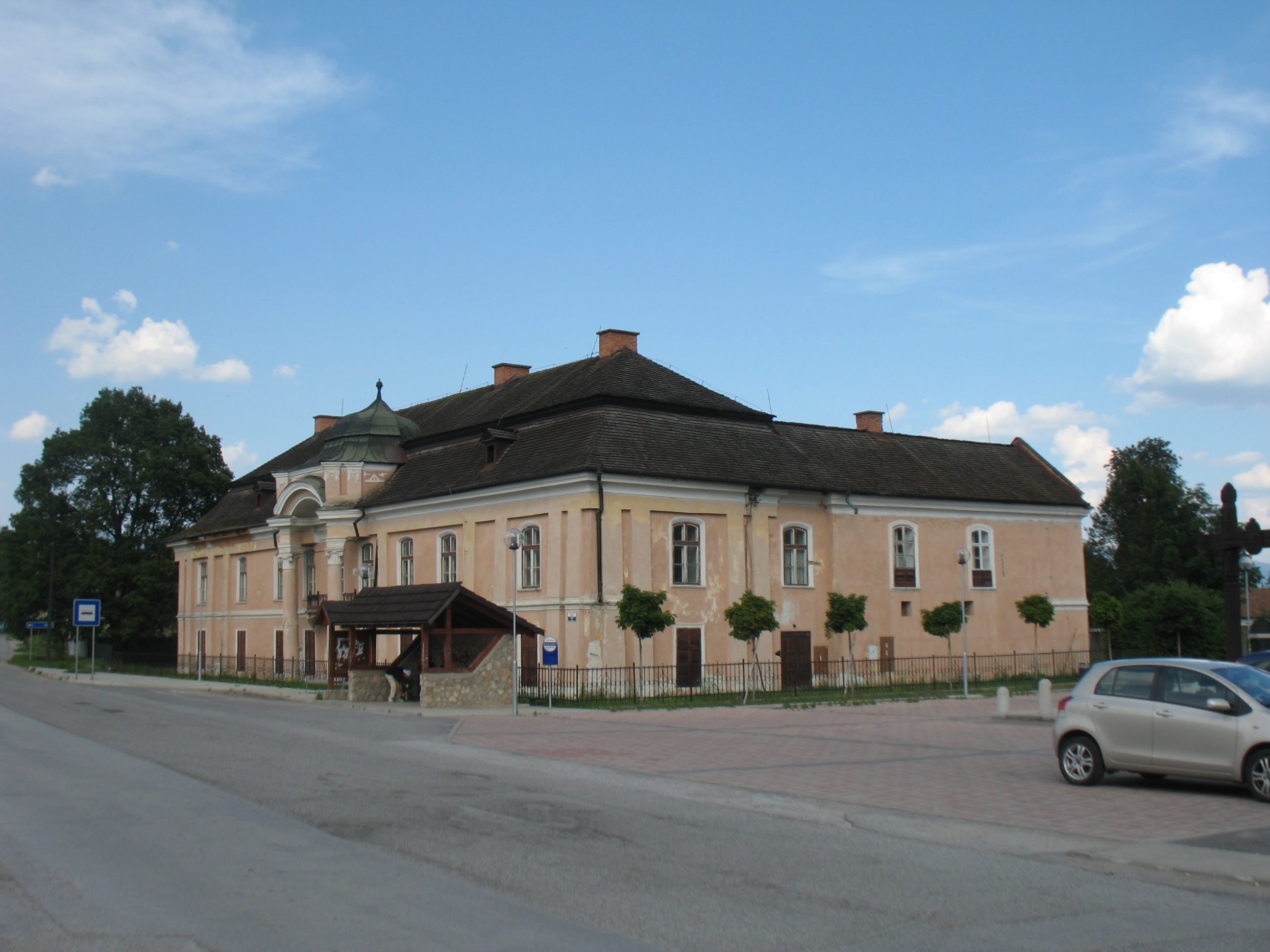 BerzéteSlovenčina: Barokový kaštieľ Mariássyovcov z roku 1792 v Brzotíne